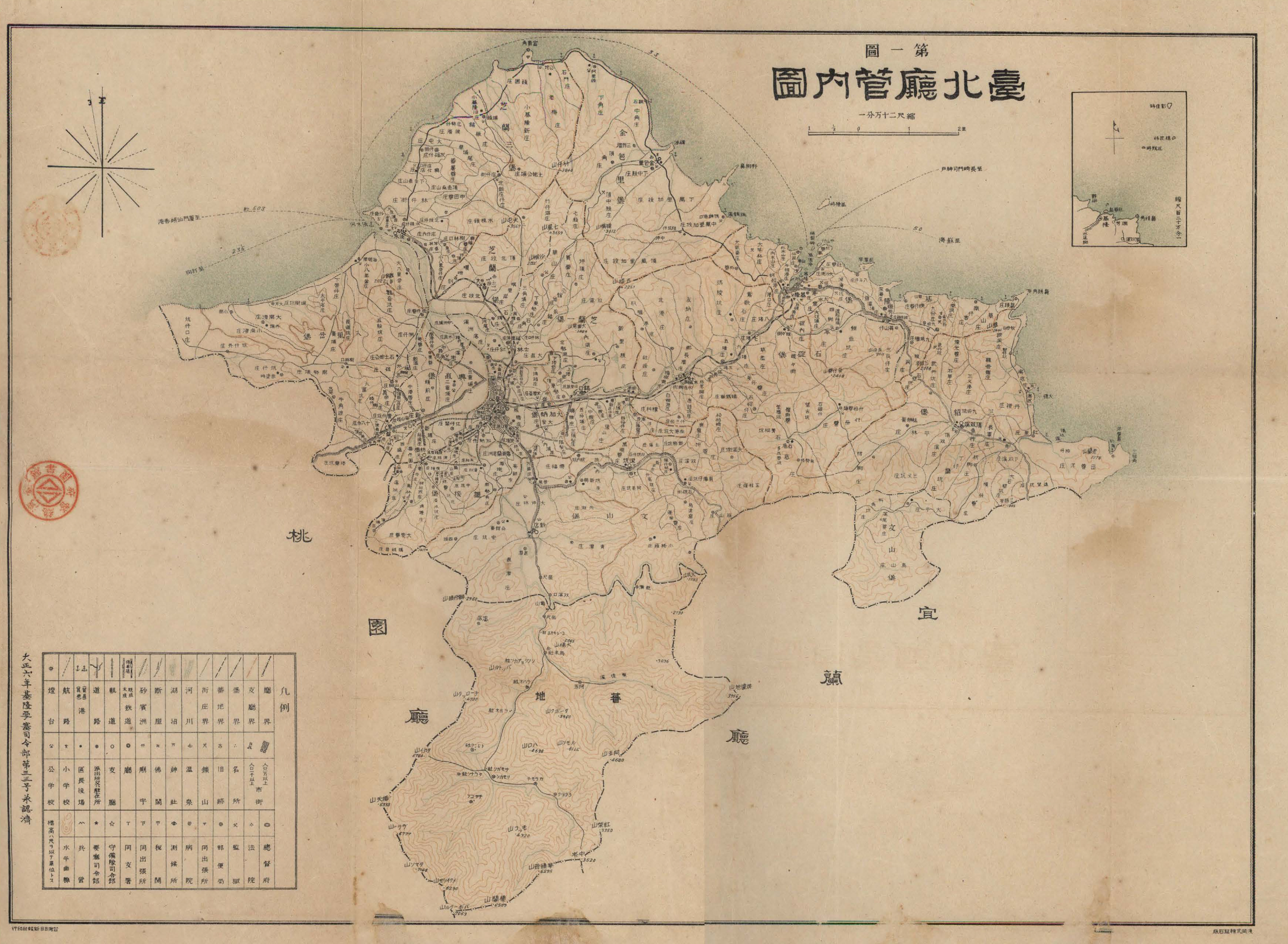 1917年的臺北廳地圖，圖上標有堡名和街庄名。其範圍約為現在台北市、基隆市和新北市。